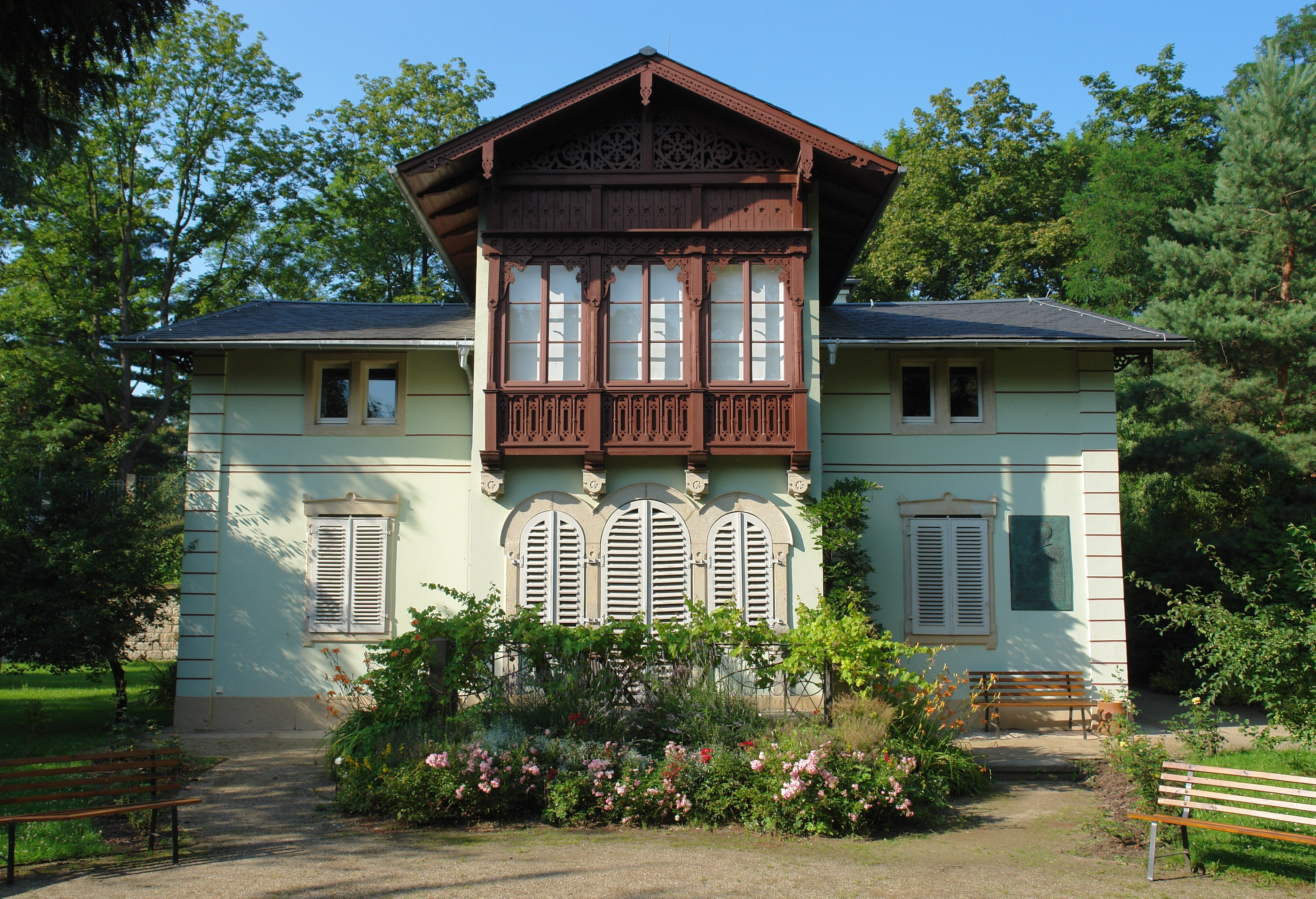 Беларуская (тарашкевіца): Музэй Крашэўскага ў Дрэздэне